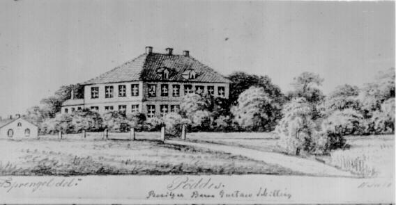 Kalvi mõis